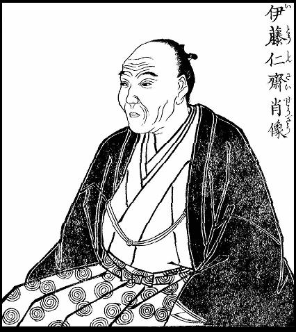 Japanese